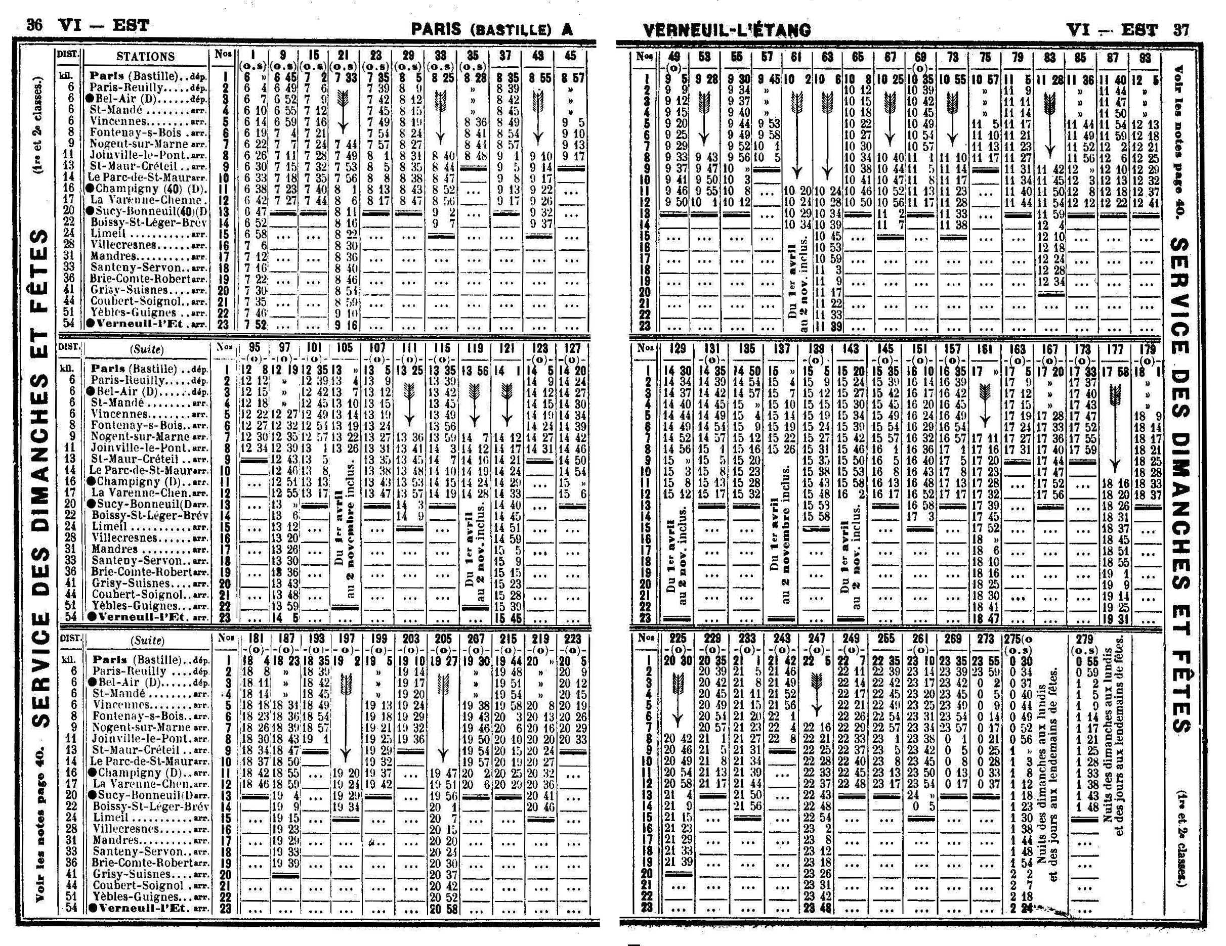 Extrait du Livret Chaix de mai 1914 Horaires de la Ligne de Vincennes (tableau aller des dimanches et fêtes)